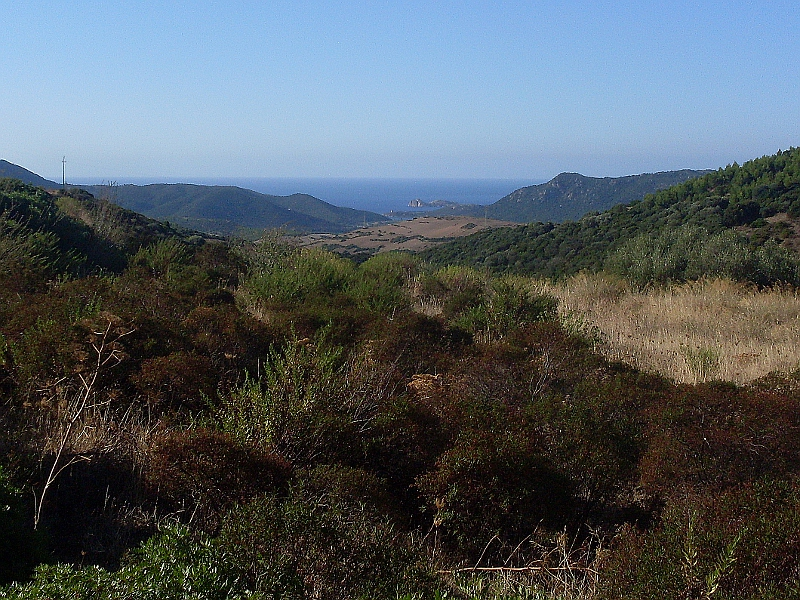 Agro di Teulada (Sardegna) presso Monte Arrubiu Unknown